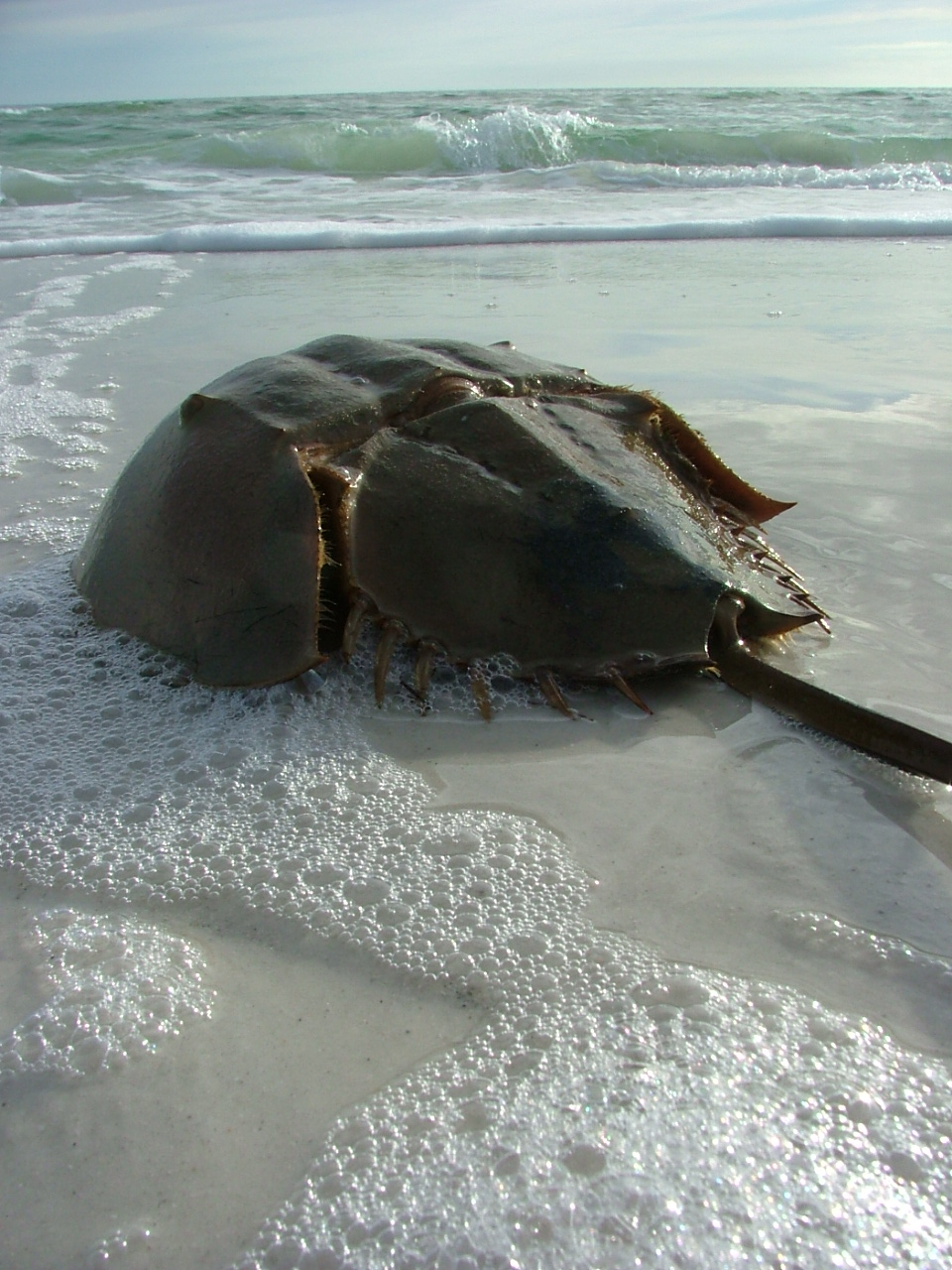 Taken on Anna Maria Island, Florida.